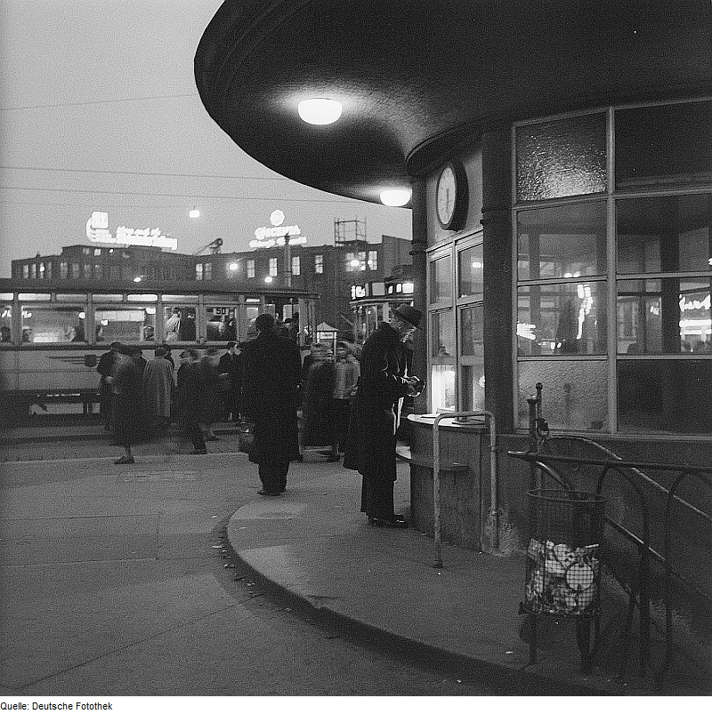 Original image description from the Deutsche Fotothek Dresden. Blick über den Postplatz